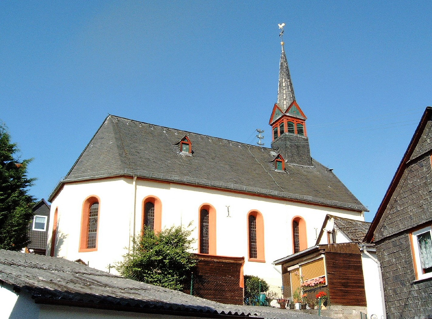 Wollmerschied kath. Kirche St.Antonius